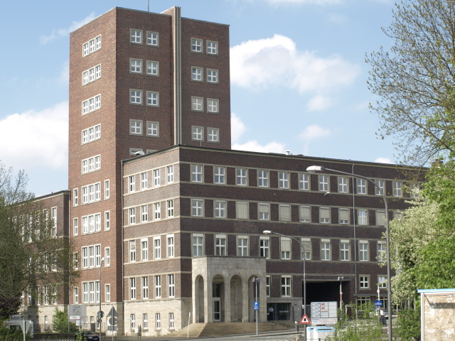 Das Hauptgebäude der ehemaligen Konsumgenossenschaft Vorwärts-Befreiung auf Clausen